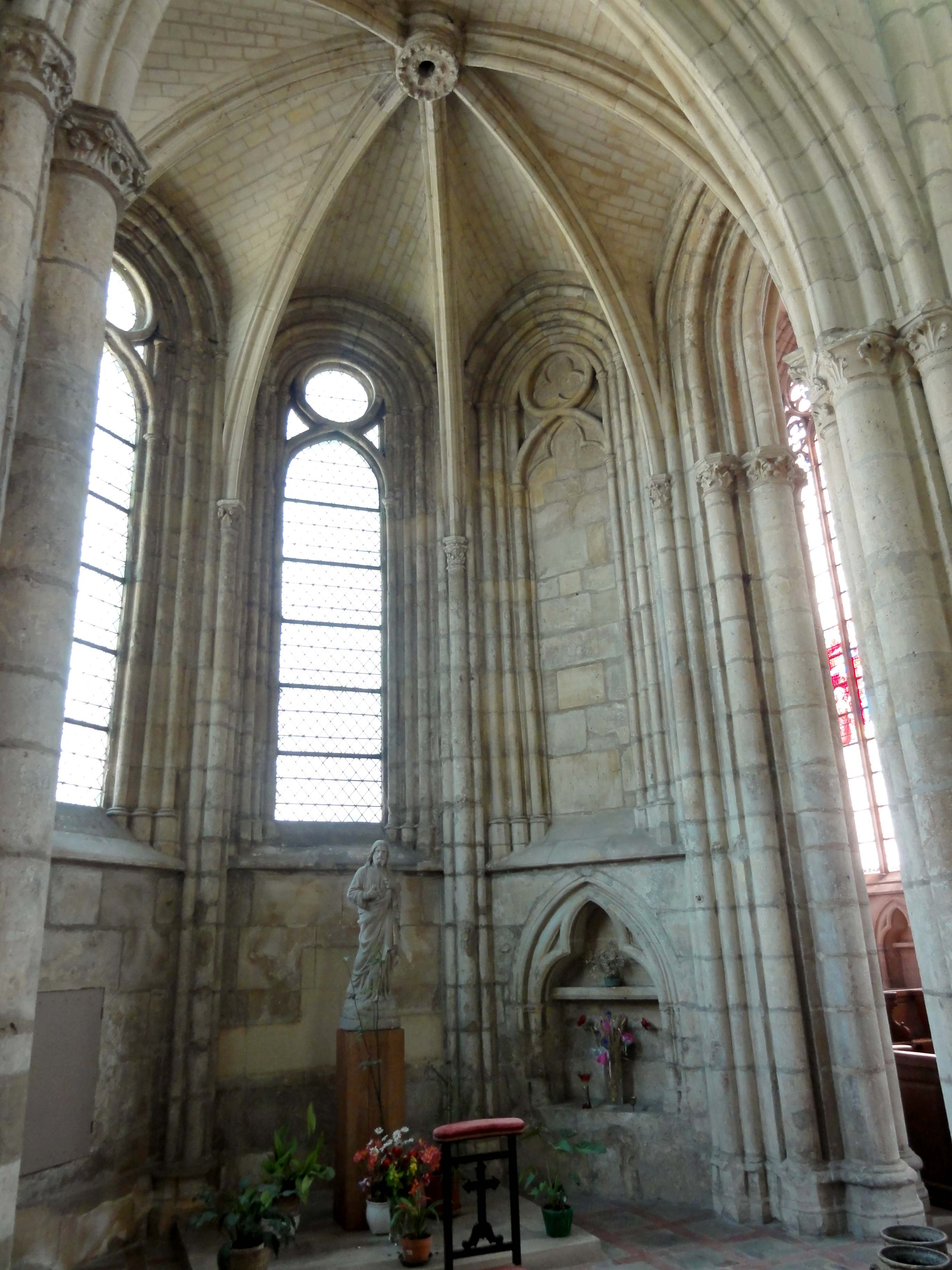 Chapelle nord.